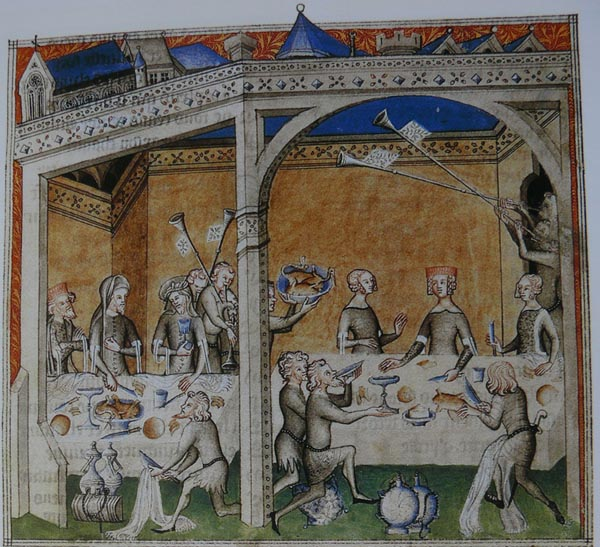 La remede de Fortune